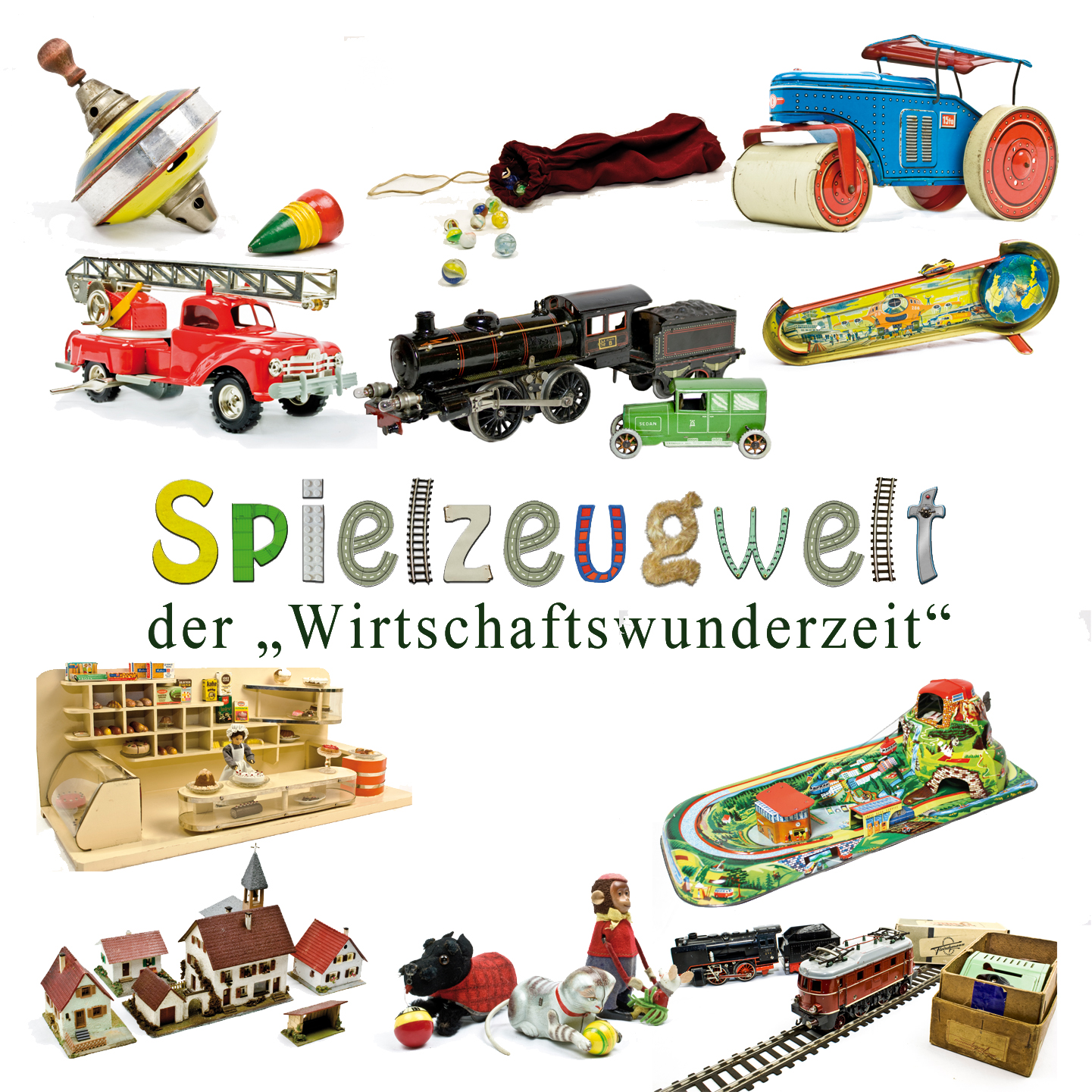 Das Cover zum Film "Spielzeug der Wirtschaftswunderzeit"